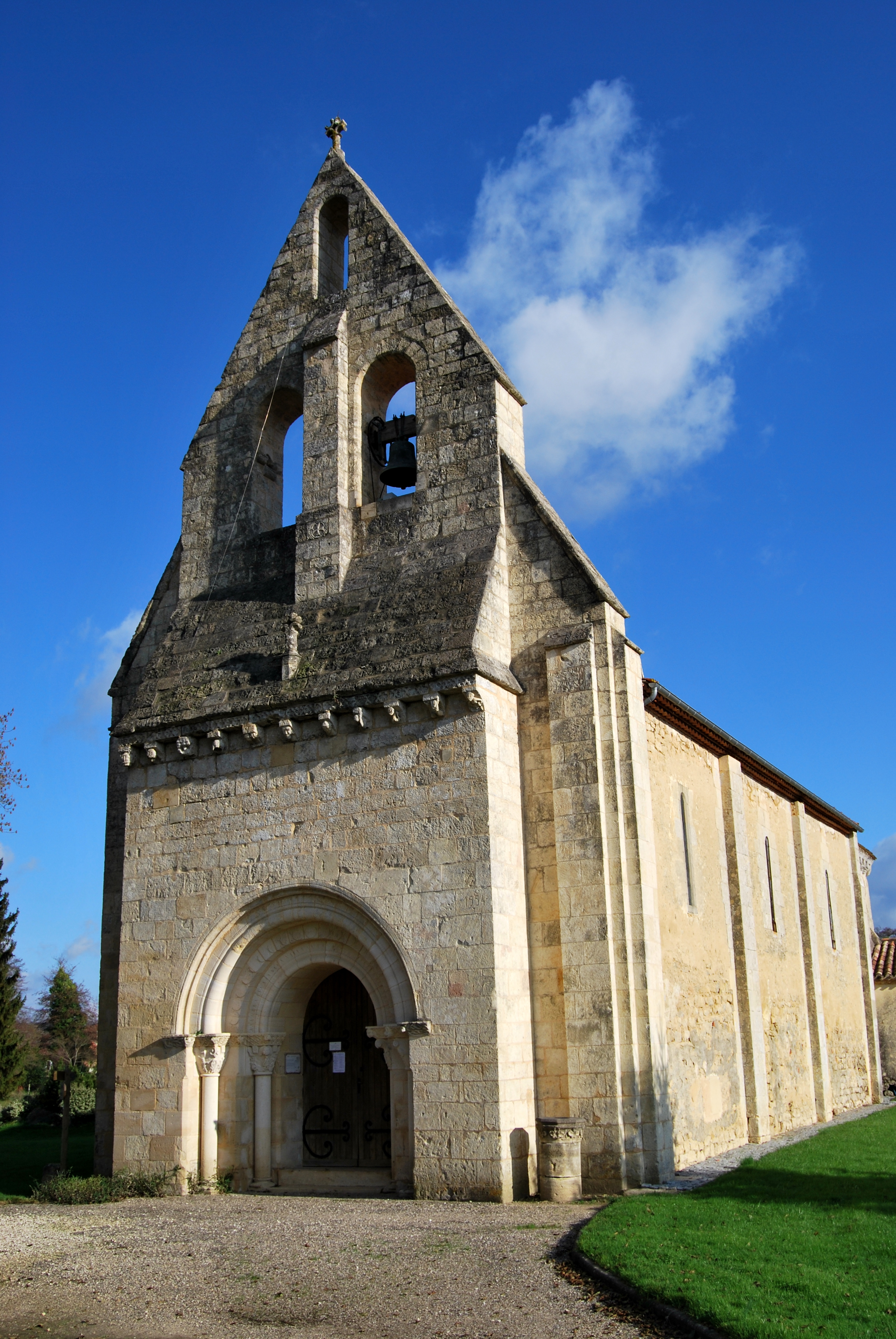 Église Saint-Martin d'Arbis